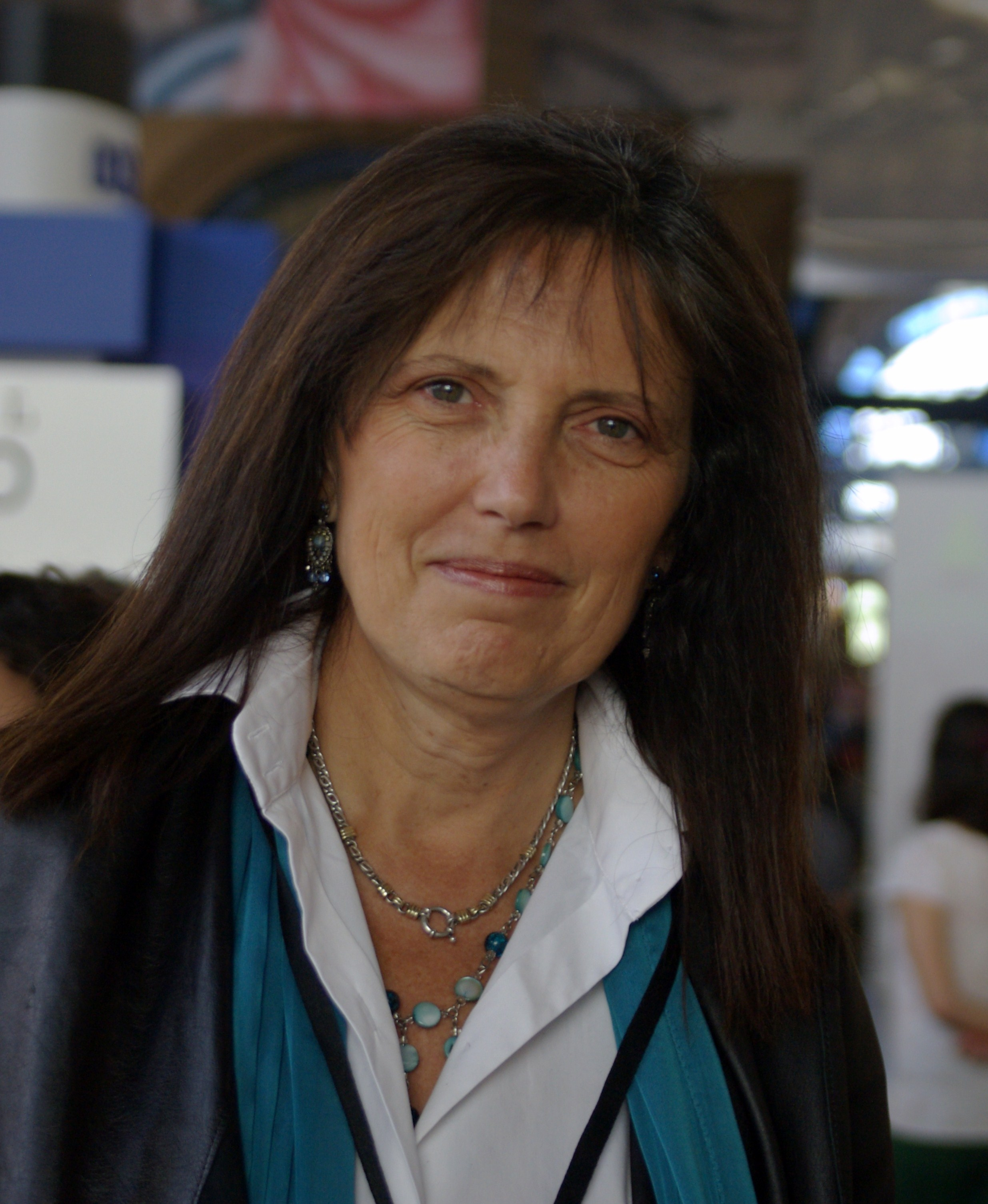 La escritora argentina Claudia Piñeiro en la Feria Internacional del Libro de Santiago 2015